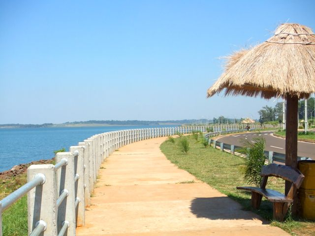 Costanera de Carmen del Paraná, Departamento de Itapúa, Paraguay.